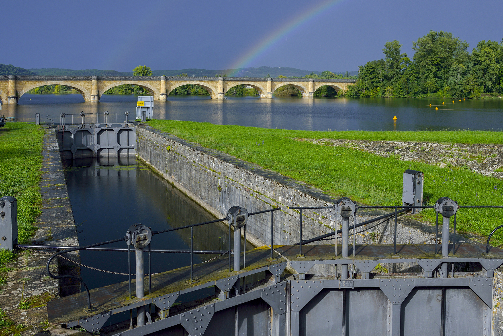 Paysage de la vallée de la Dordogne en Périgord, au village de Mauzac débute le canal latéral à la Dordogne dit canal de Lalinde et sa toute première écluse, édifice protegé au titre des monuments historiques, ciel d’orage avec arc-en-ciel, commune de Mauzac-et-Grand-Castang, Dordogne, France, Europe.